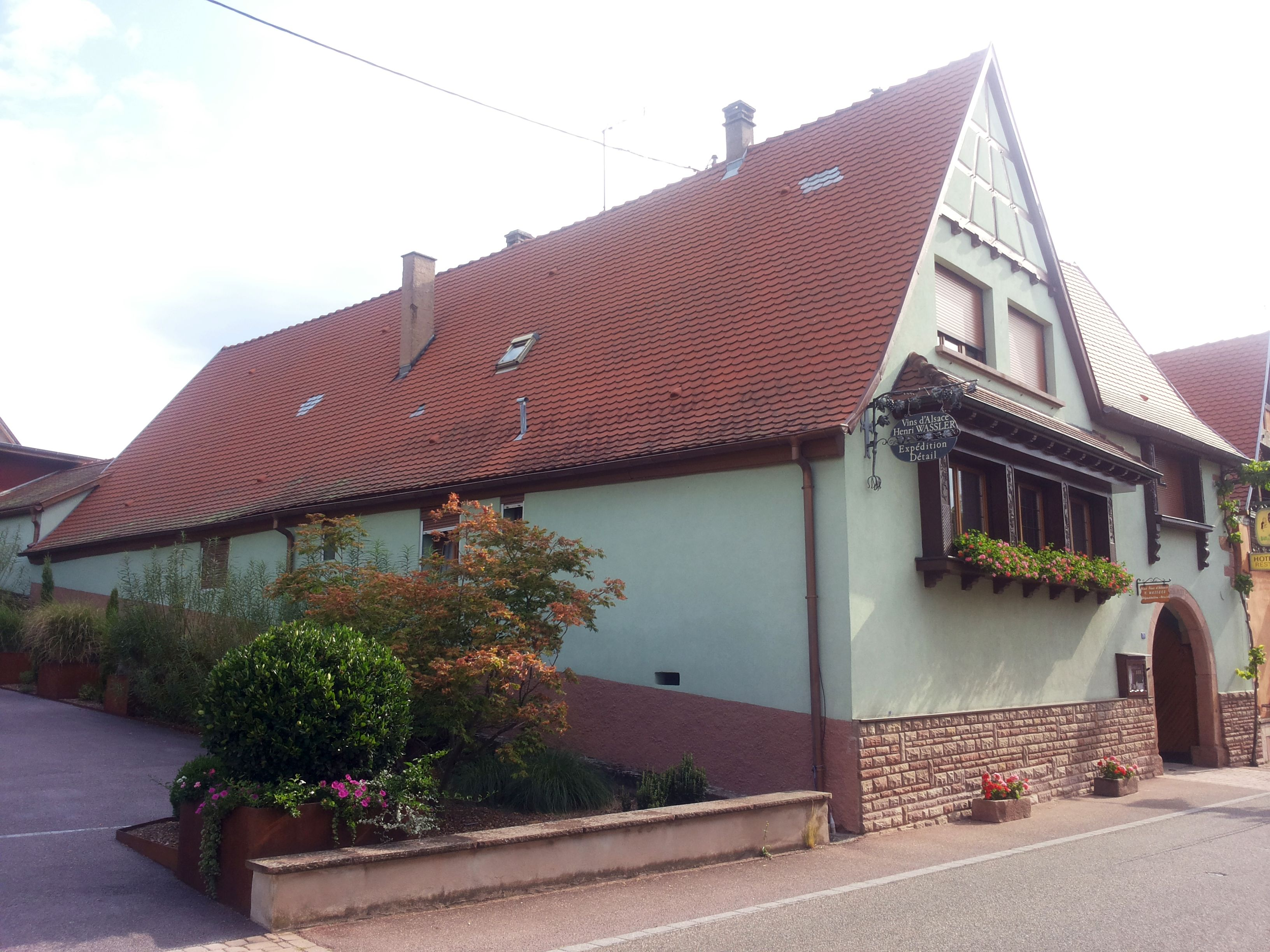 Ancienne Synagogue d'Itterswiller, 76 route du Vin